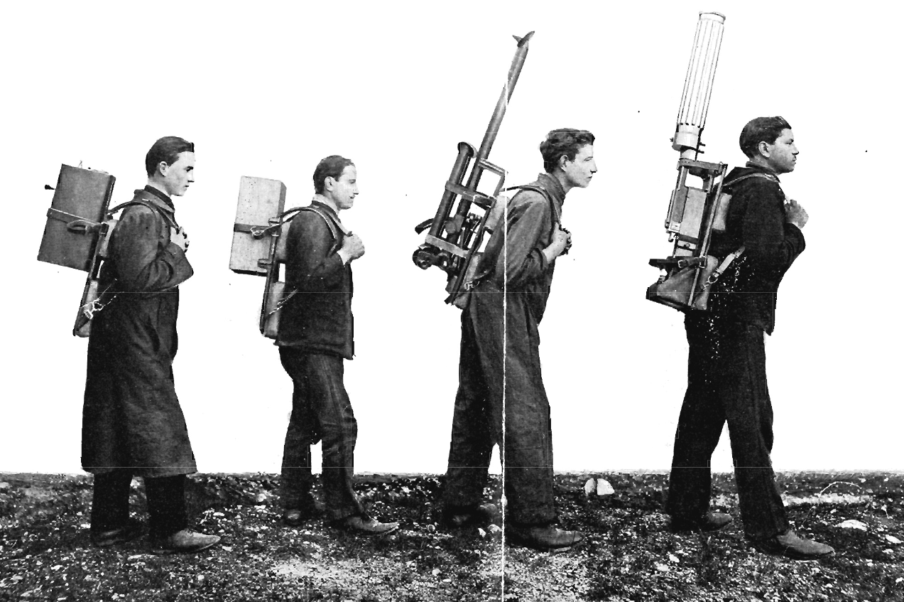 Transport strojnice Fiat-Revelli M1914 na ramah.